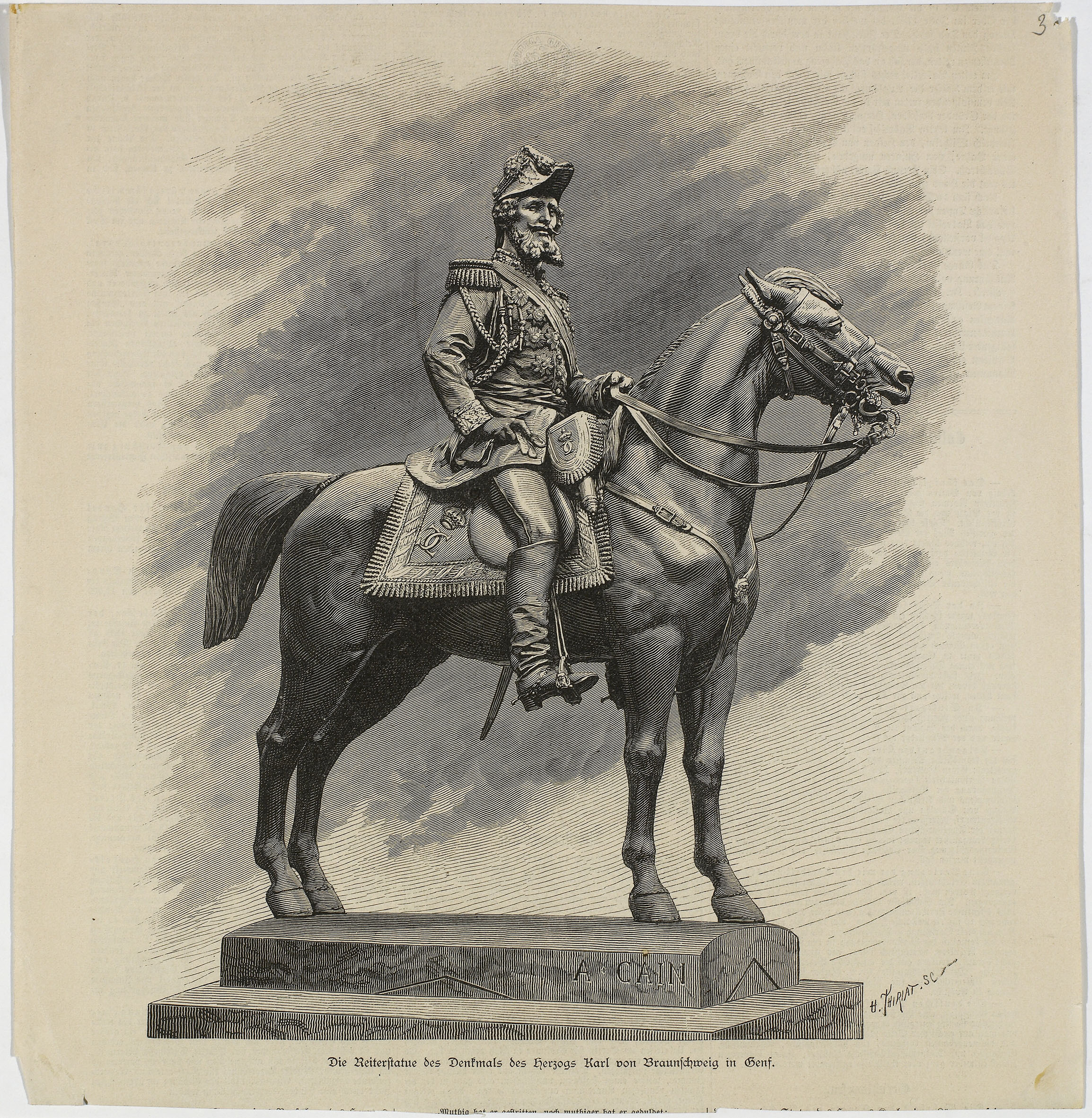 Genève, la statue équestre du monument Brunswick, gravure de Henri Thiriat (1866-1897)